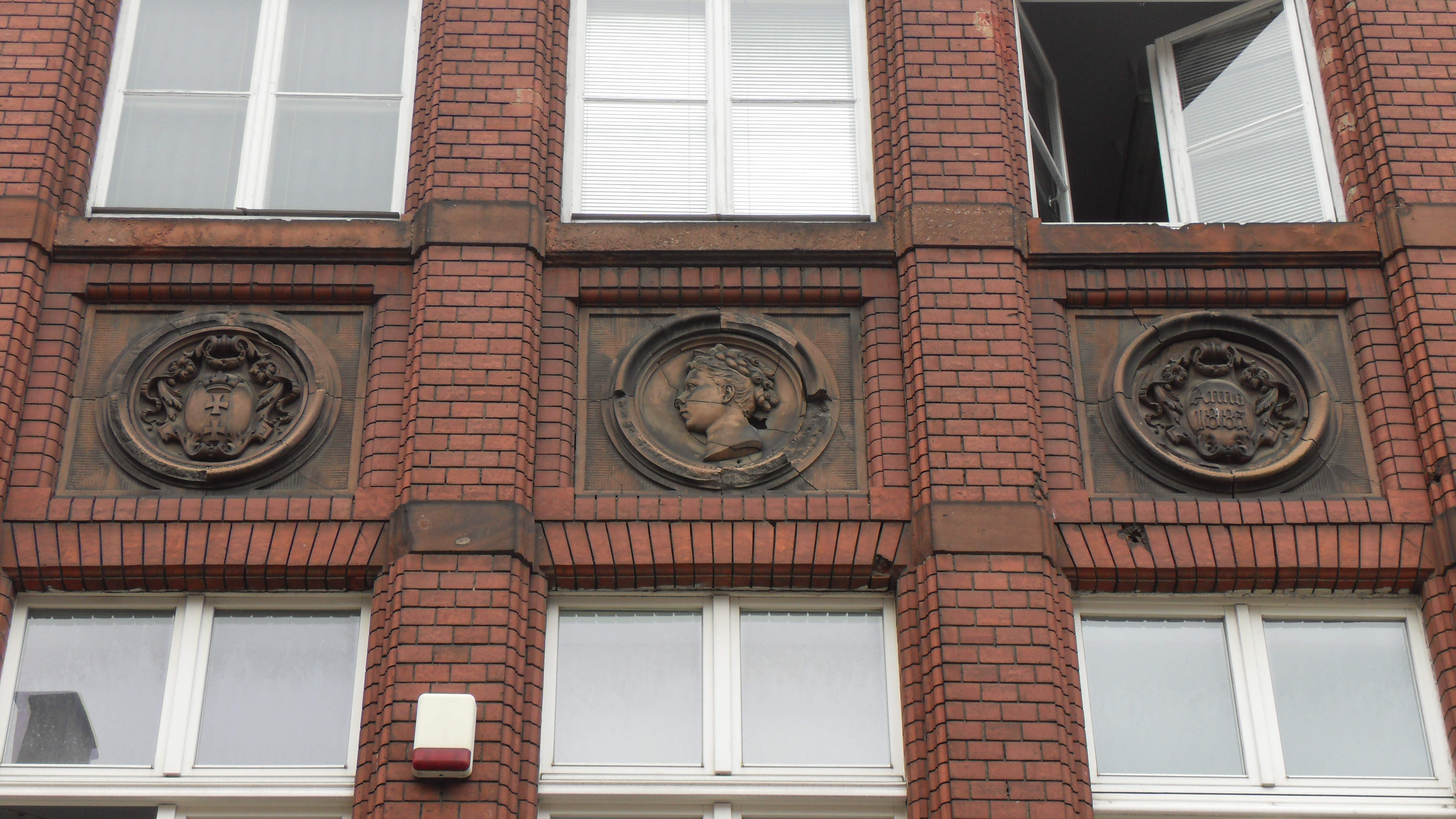 Gdańsk Stare Przedmieście, dawna "Victoriaschule".